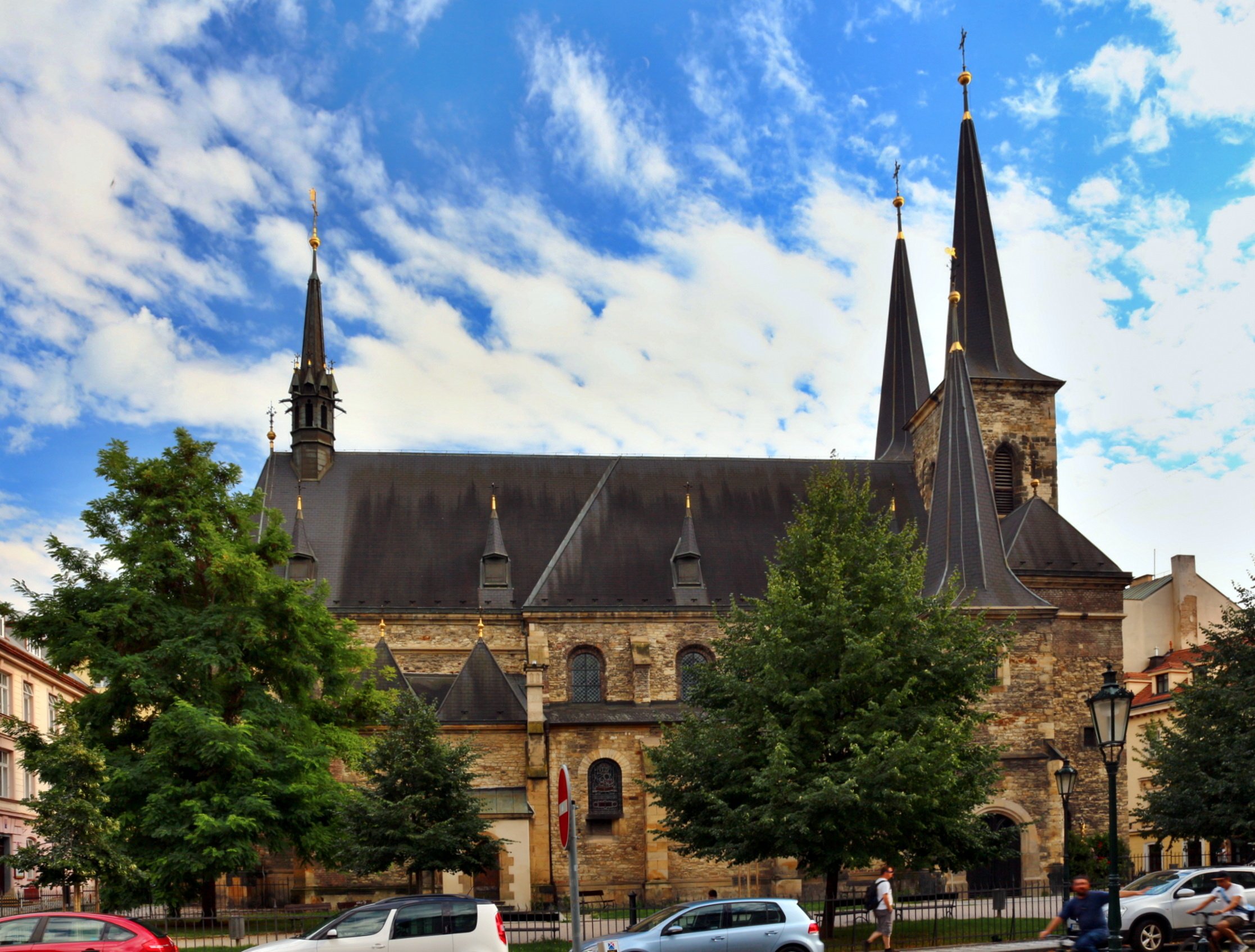 Kostel svatého Petra Na Poříčí